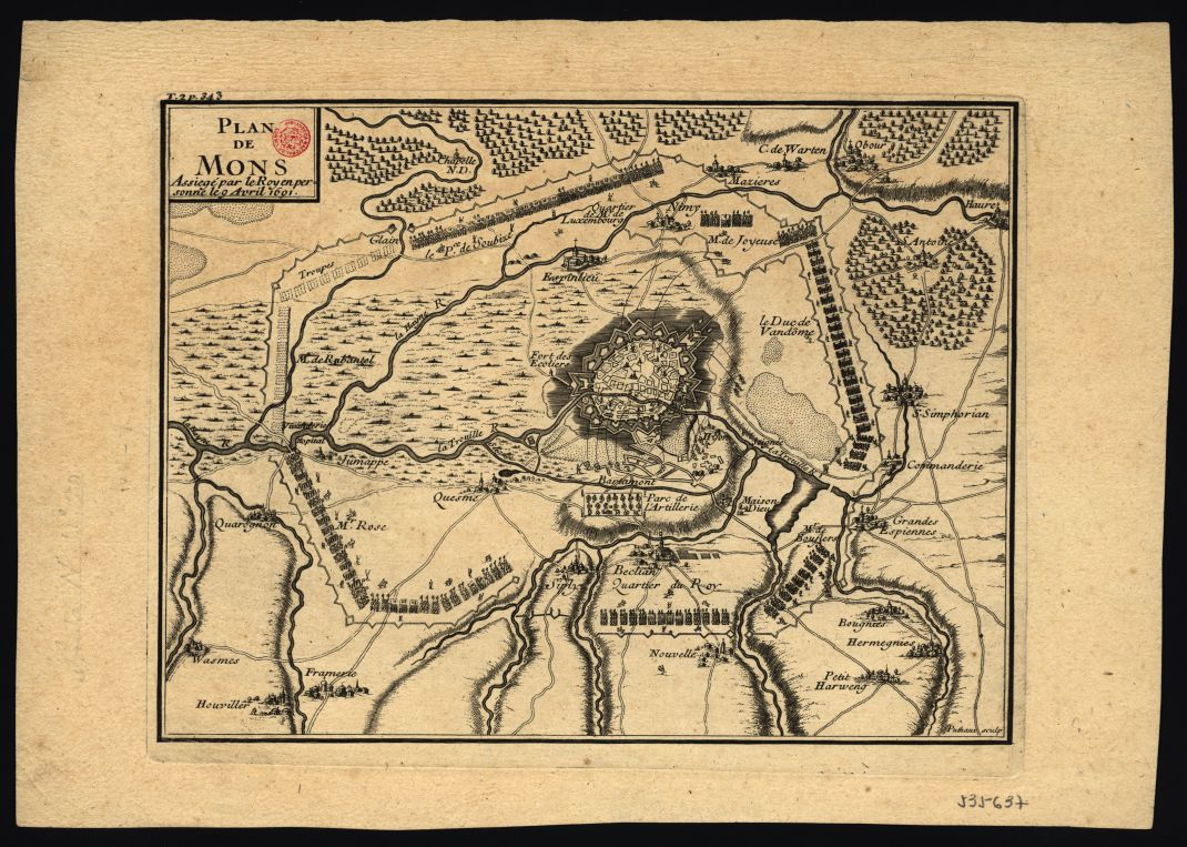 Carte représentant le siège de Mons (Belgique-Hainaut) en 1691.